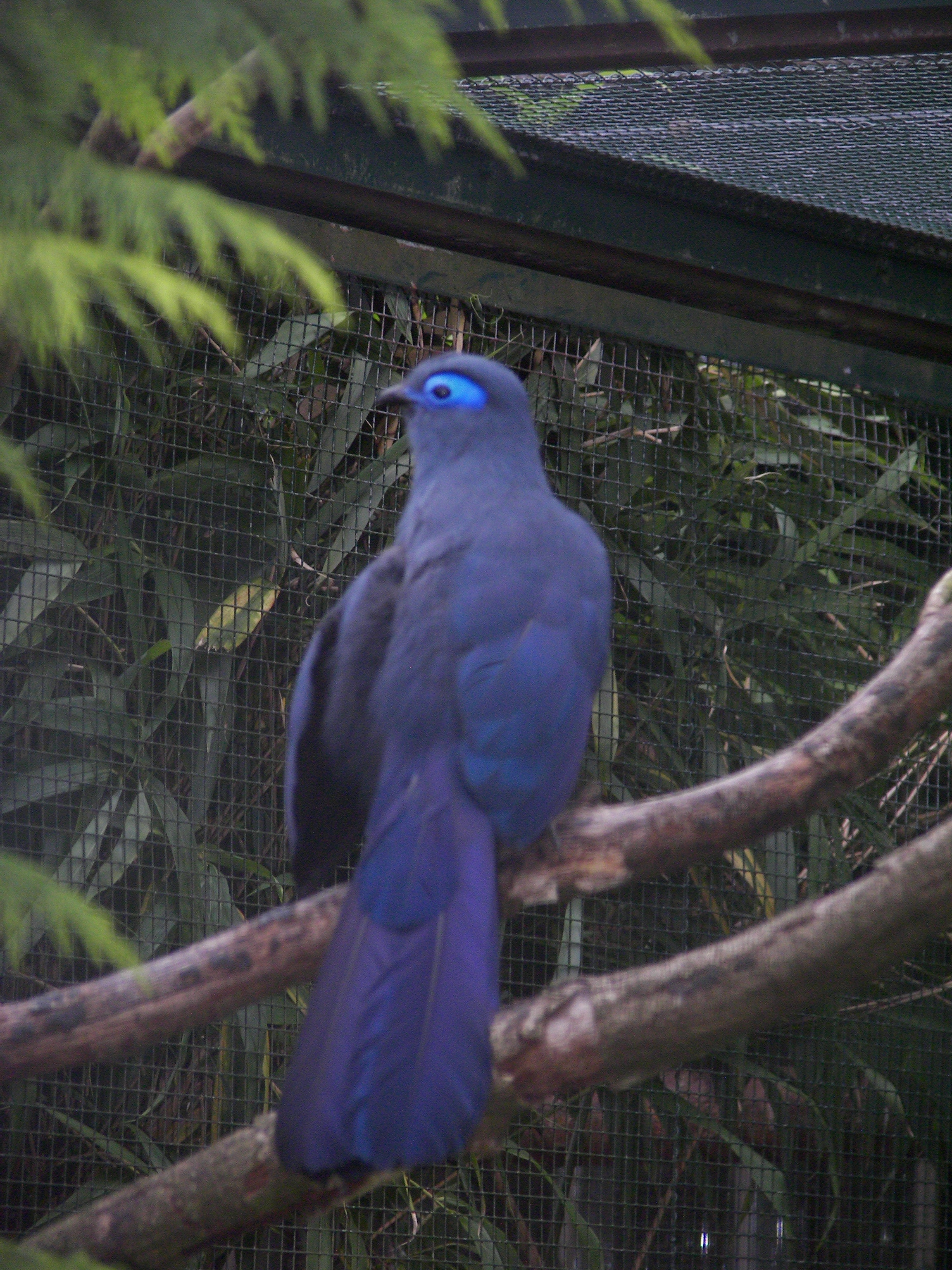 Coua bleu (Coua caerulea)